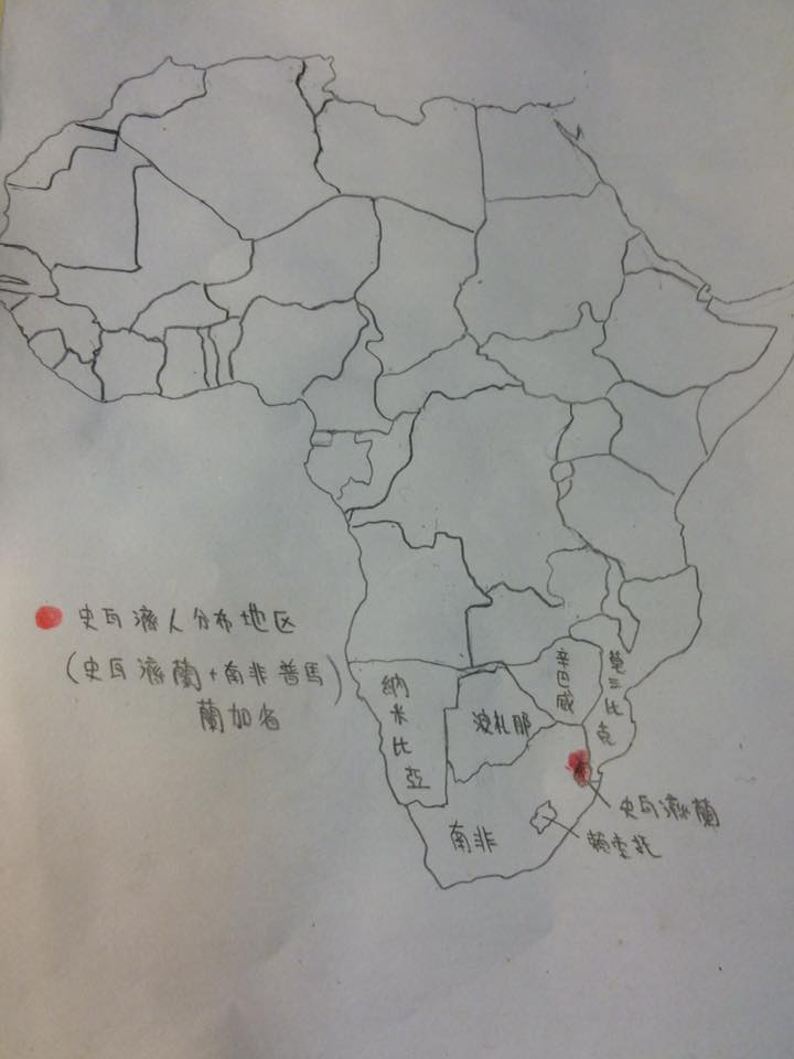 中文（台灣）: 史瓦濟人手繪分布圖